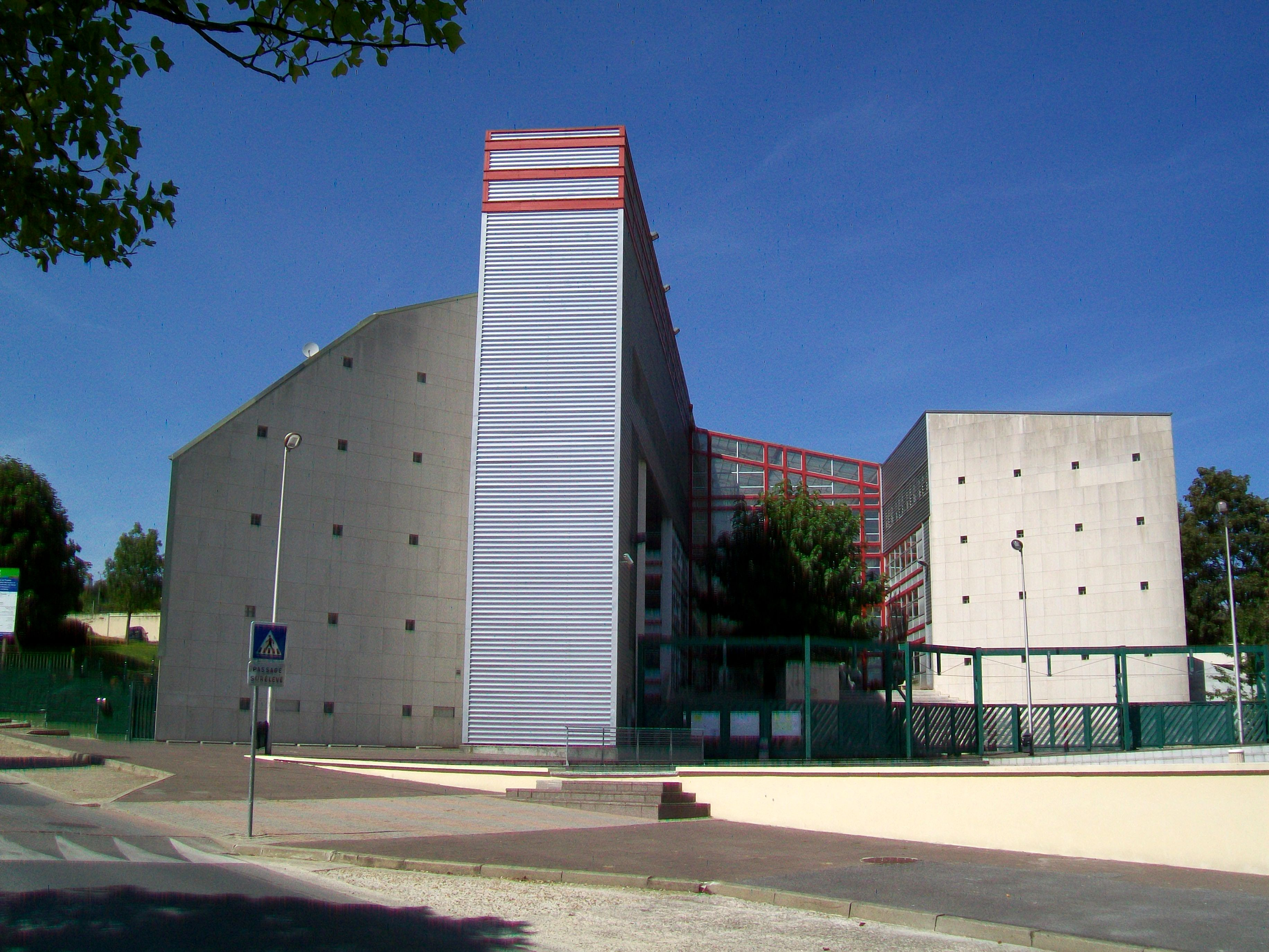 Le lycée André-Malraux, cavée des Aiguillons.